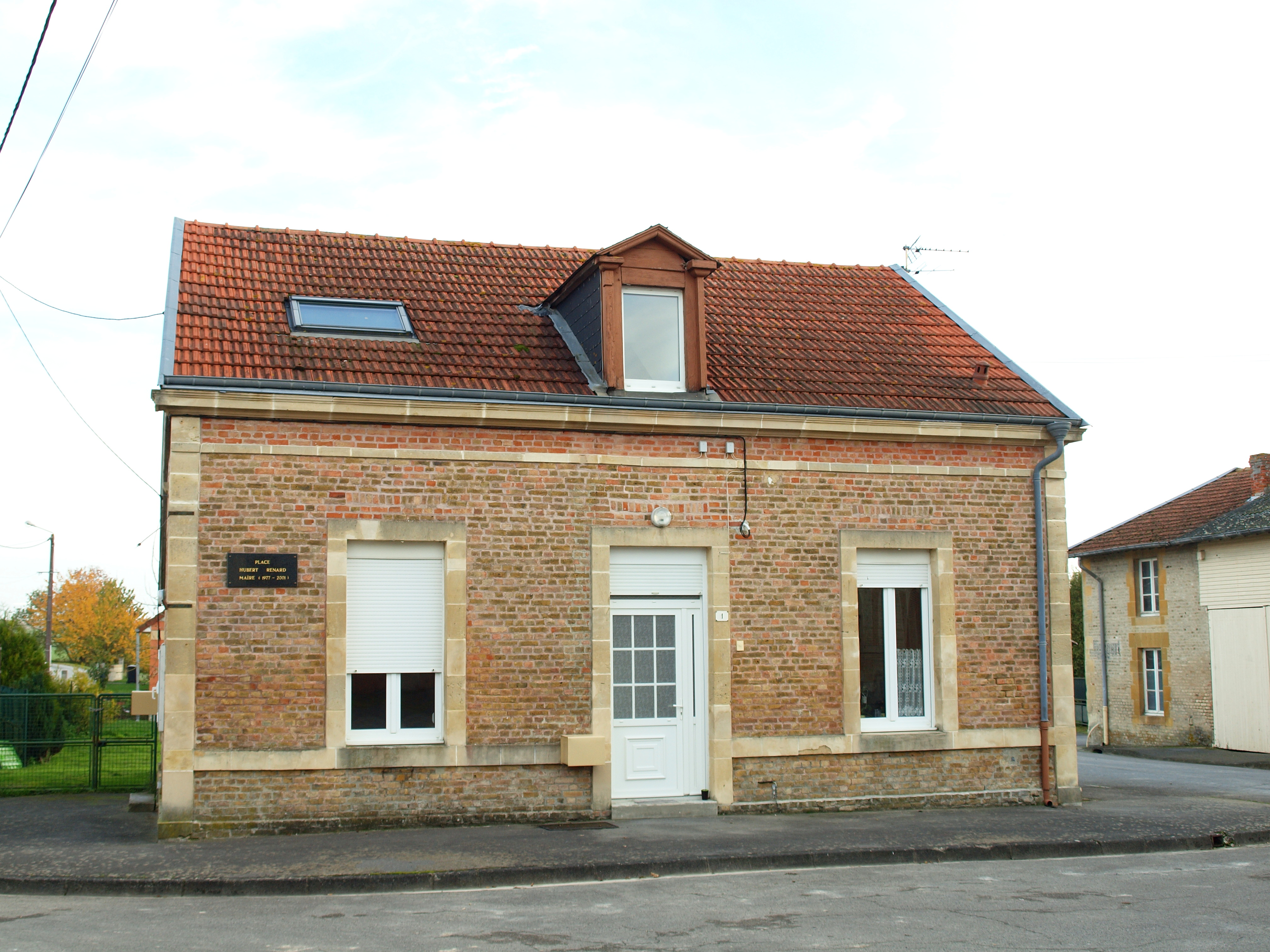 Dricourt (Ardennes, France)